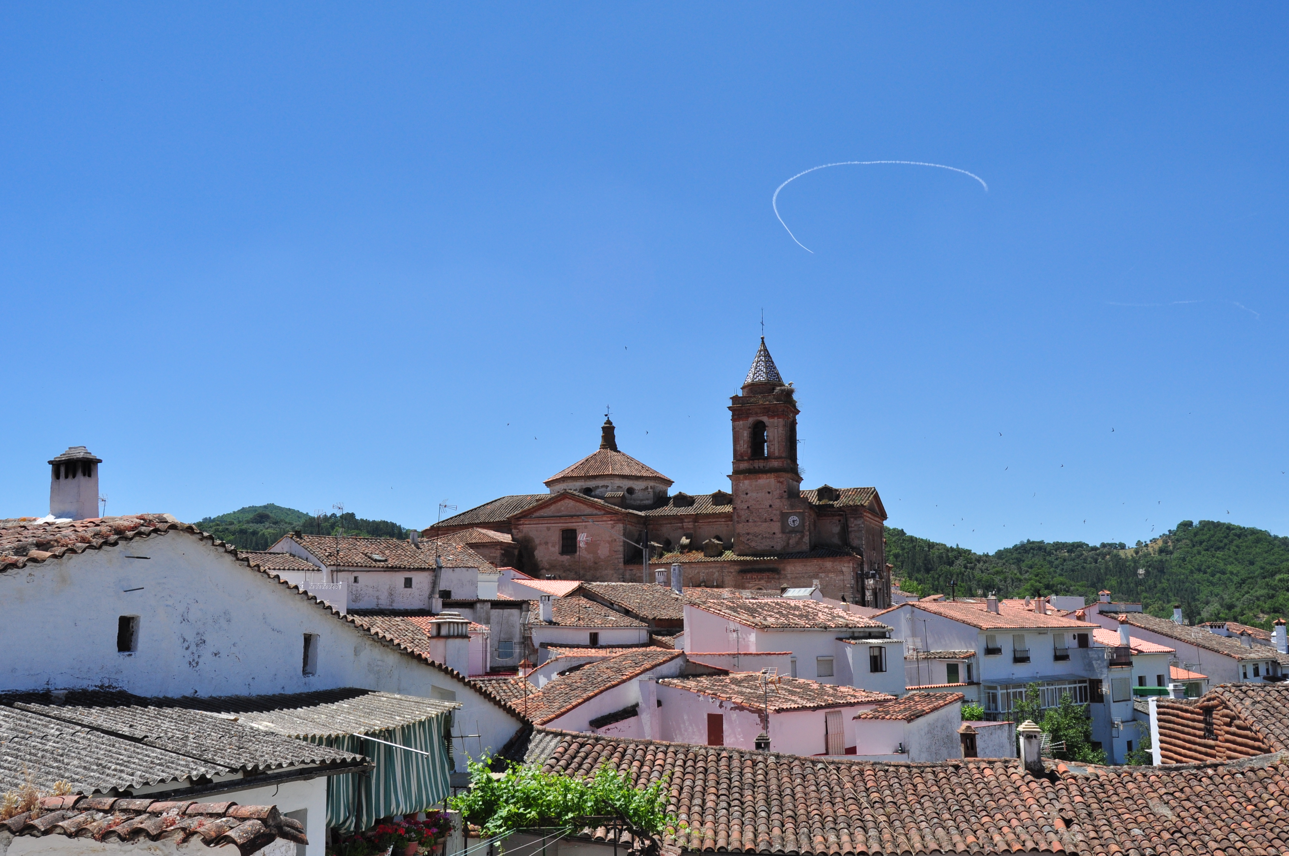 Galaroza - 009